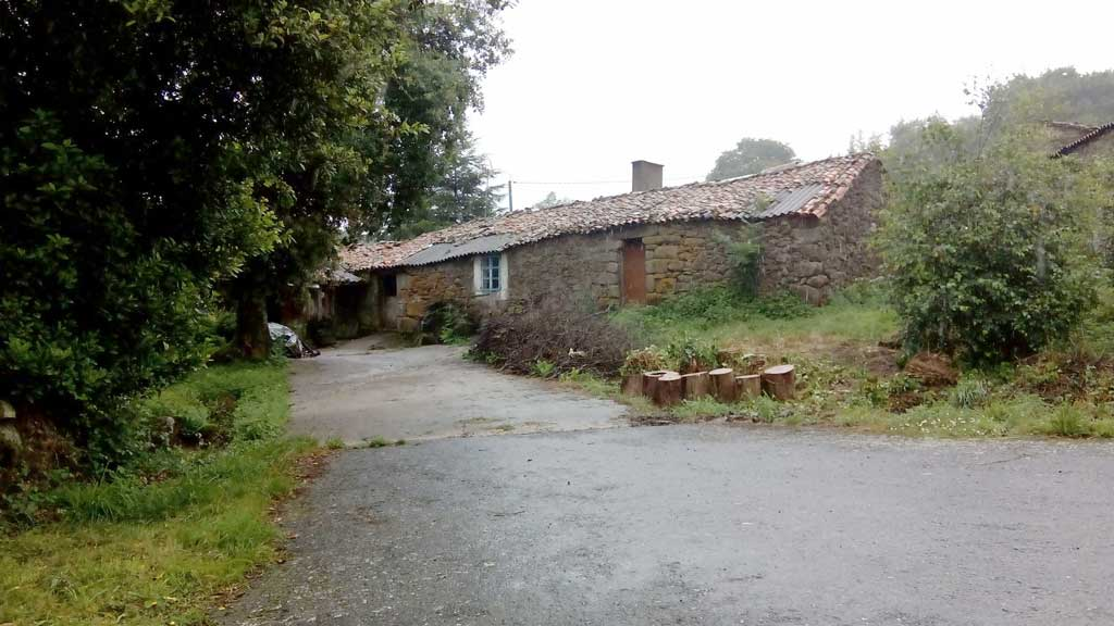 Vista de Zafrela, Curtis.